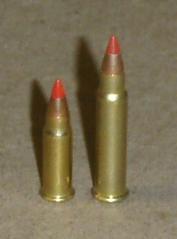 .17 caliber rimfire cartridges